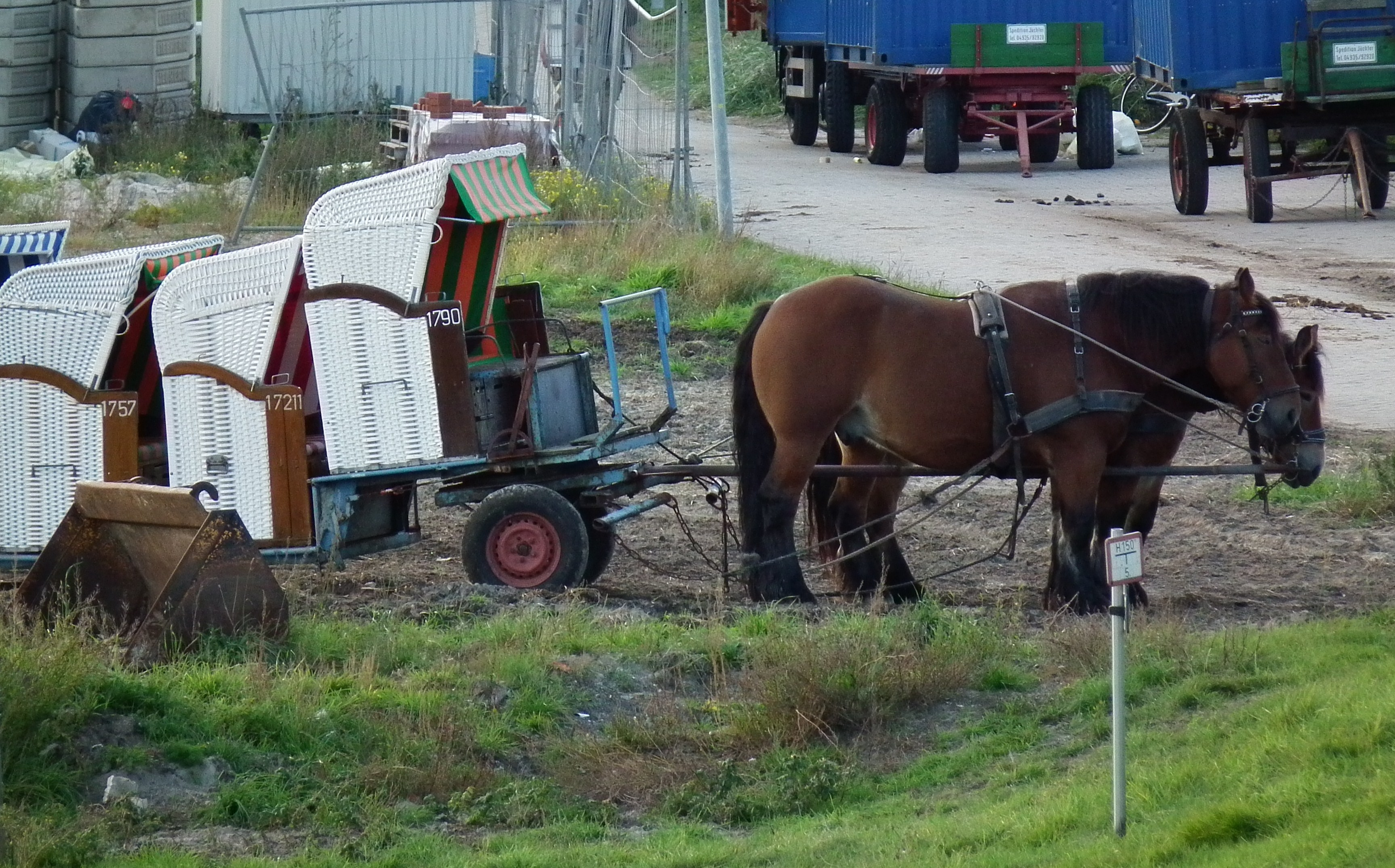 Abtransport von Strandkörben ins Winterquartier mit Hilfe von Pferden, fotografiert auf der ostfriesischen Nordseeinsel Juist (Niedersachsen, Deutschland)